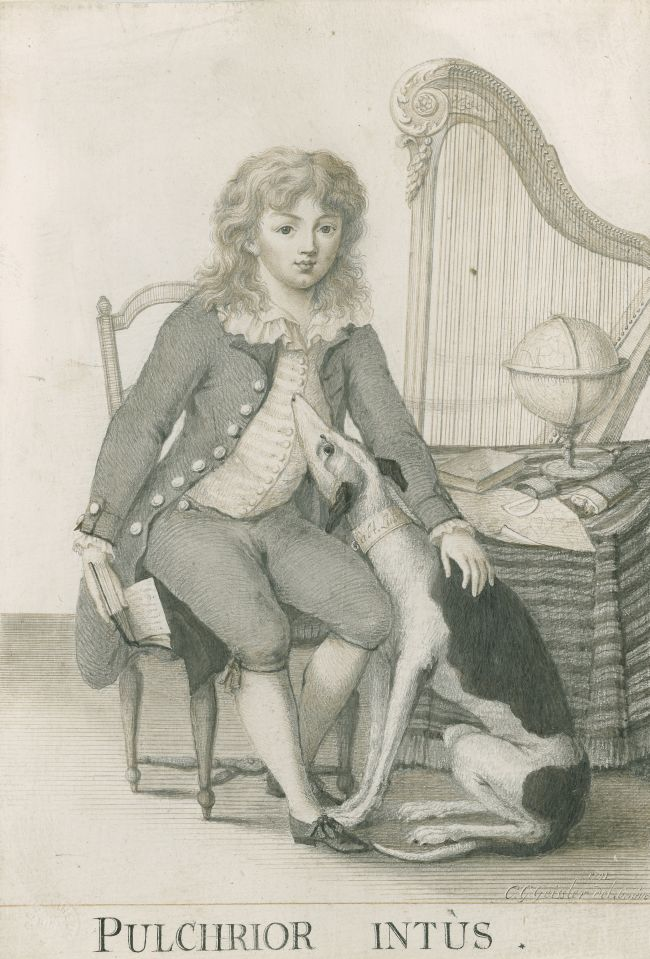 Henryk Lubomirski z psem i harfą